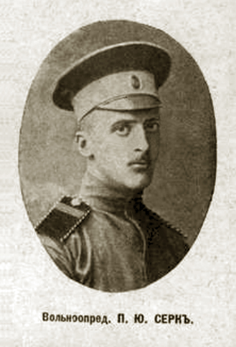 Вольноопределяющийся Павел Серк Вырезка из иллюстрированного приложения к газете "Новое время" № 13852 от 4 (17) октября 1914 г.